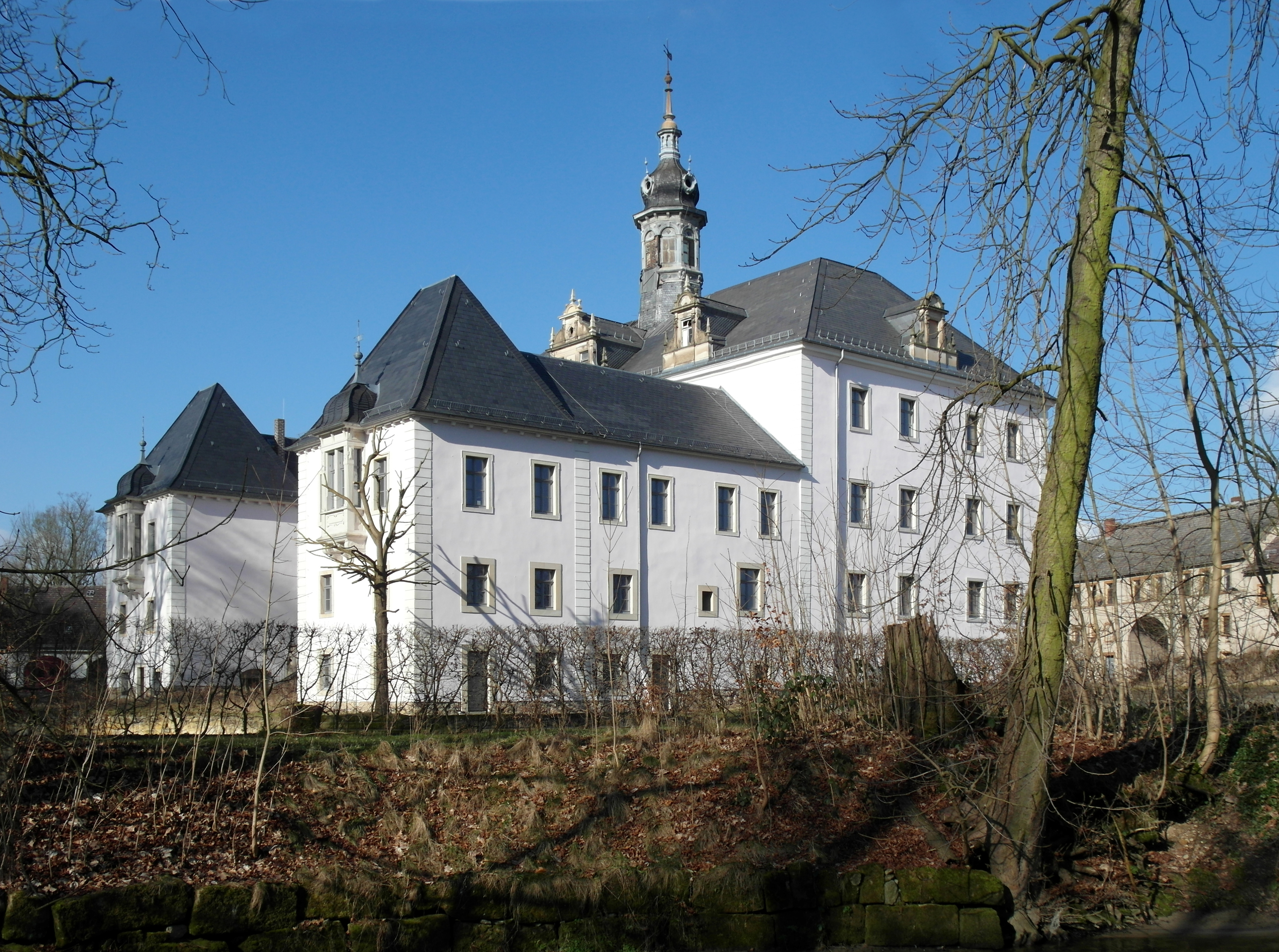 13.02.2018 01833 Dittersbach (Dürrröhrsdorf-Dittersbach) Schloß Dittersbach, Hauptstraße 113 (GMP: 51.035504,13.988688): Drei-Flügel-Anlage, 1555 bis 1563 für den sächsischen Kanzler Dr. Hieronymus Kiesewetter errichtet. 1829 kaufte Johann Gottlob von Quandt Rittergut und Schloß und gab ihm 1830 sein heutiges Aussehen. Seit 1925 war das Schloß als Erholungsheim im Besitz der Stadt Dresden. In der DDR-Zeit wurde es von einer Landwirtschaftlichen Produktionsgenossenschaft (LPG) genutzt. 2004 verkaufte die Stadt Dresden den Gebäudekomplex mit dem Park an die Heinrich & Müller GmbH aus Stuttgart, die das Anwesen schrittweise saniert. Sicht von Südosten. [SAM3899.JPG]20180313135DR.JPG(c)Blobelt